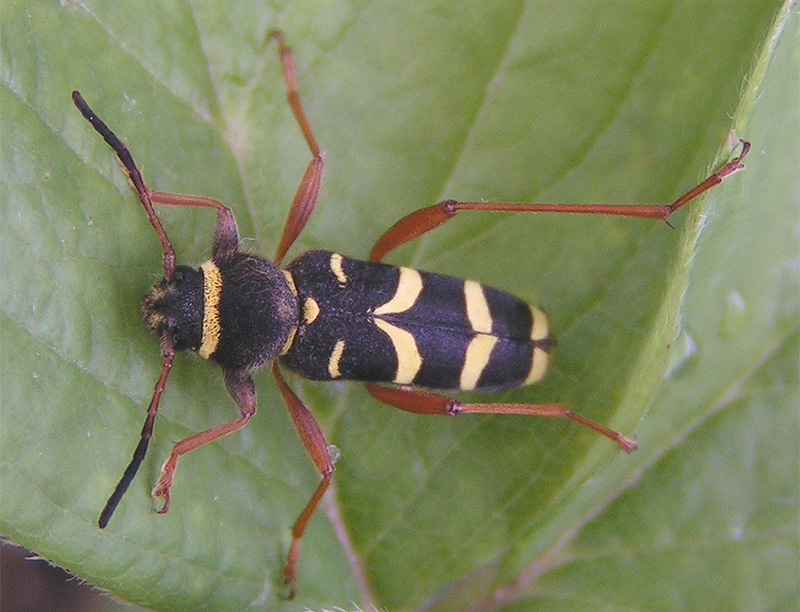 Echter Widderbock (Clytus arietis)